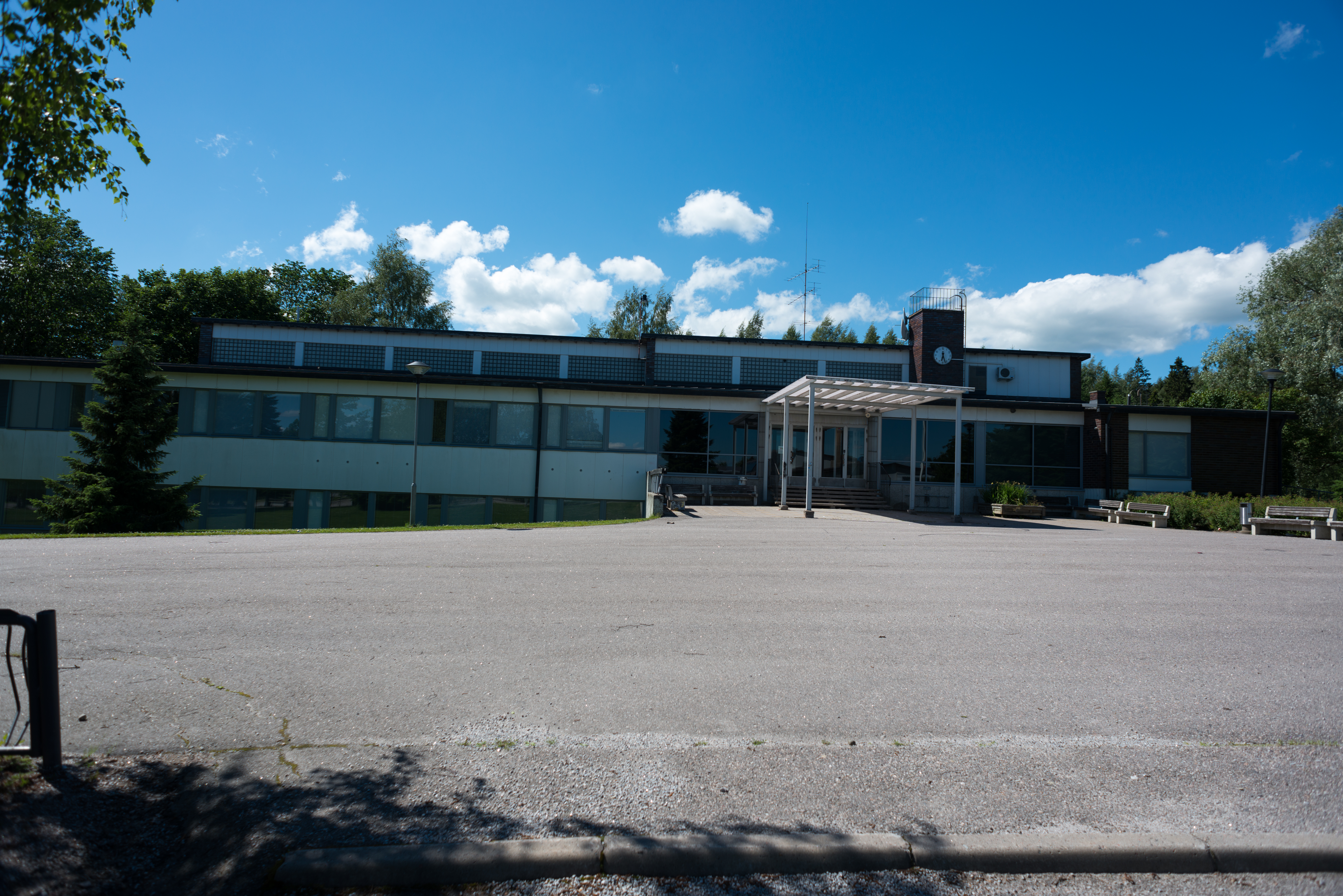 Laurin koulu Salossa